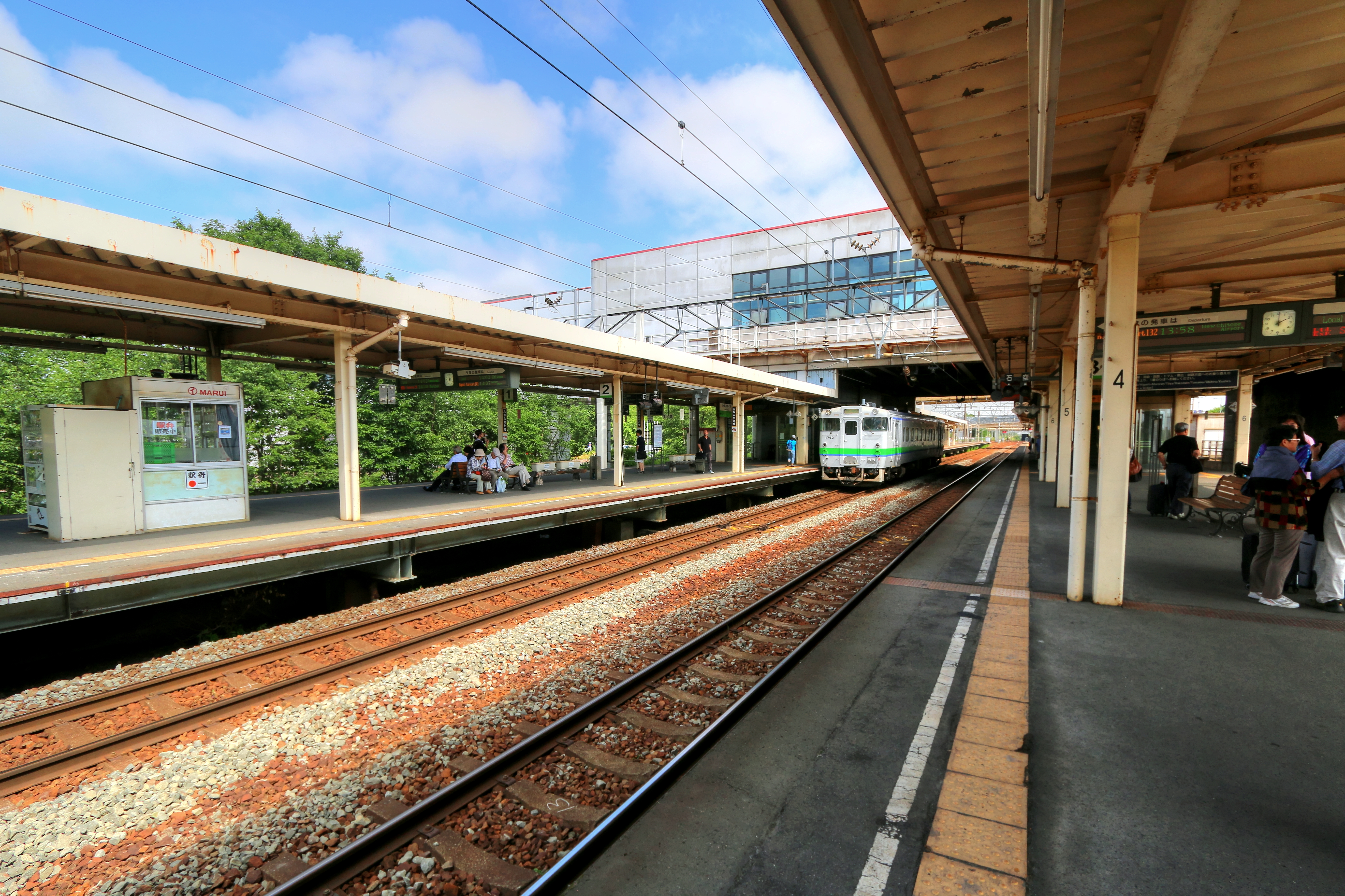 南千歳駅